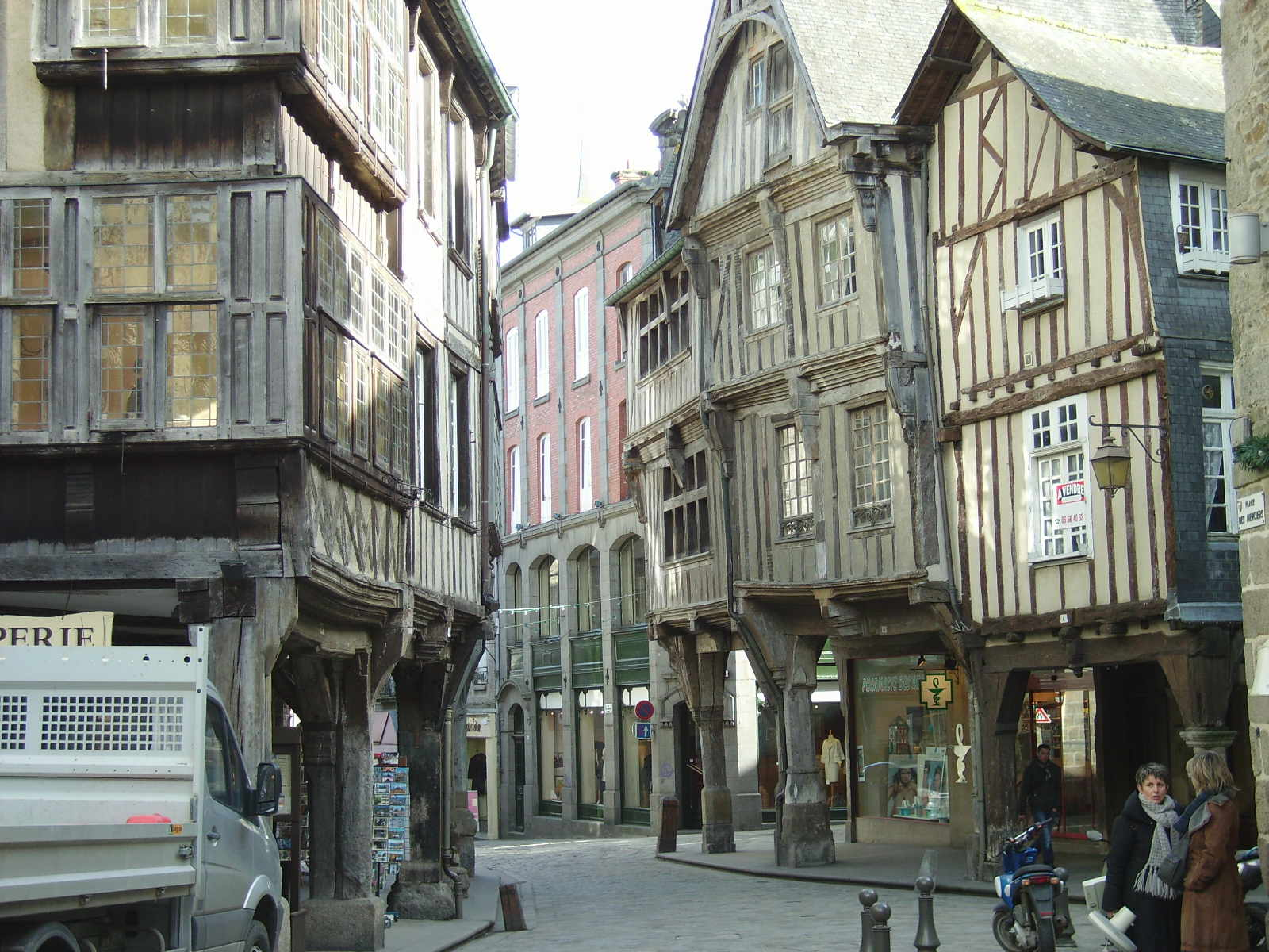 Trabfakaj domoj en Dinan